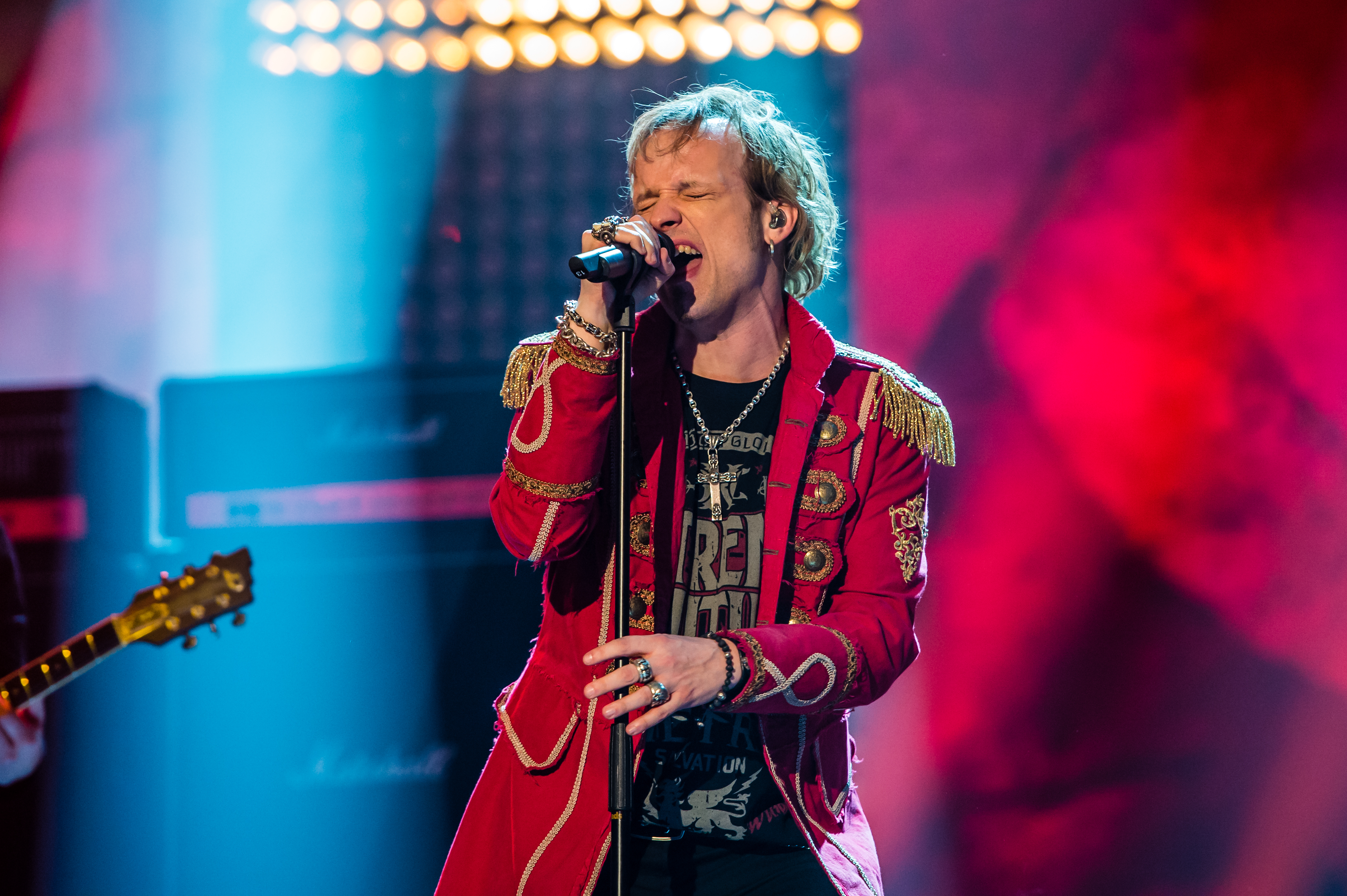 Eurovision Song Contest 2016 - Unser Lied für Stockholm - Avantasia